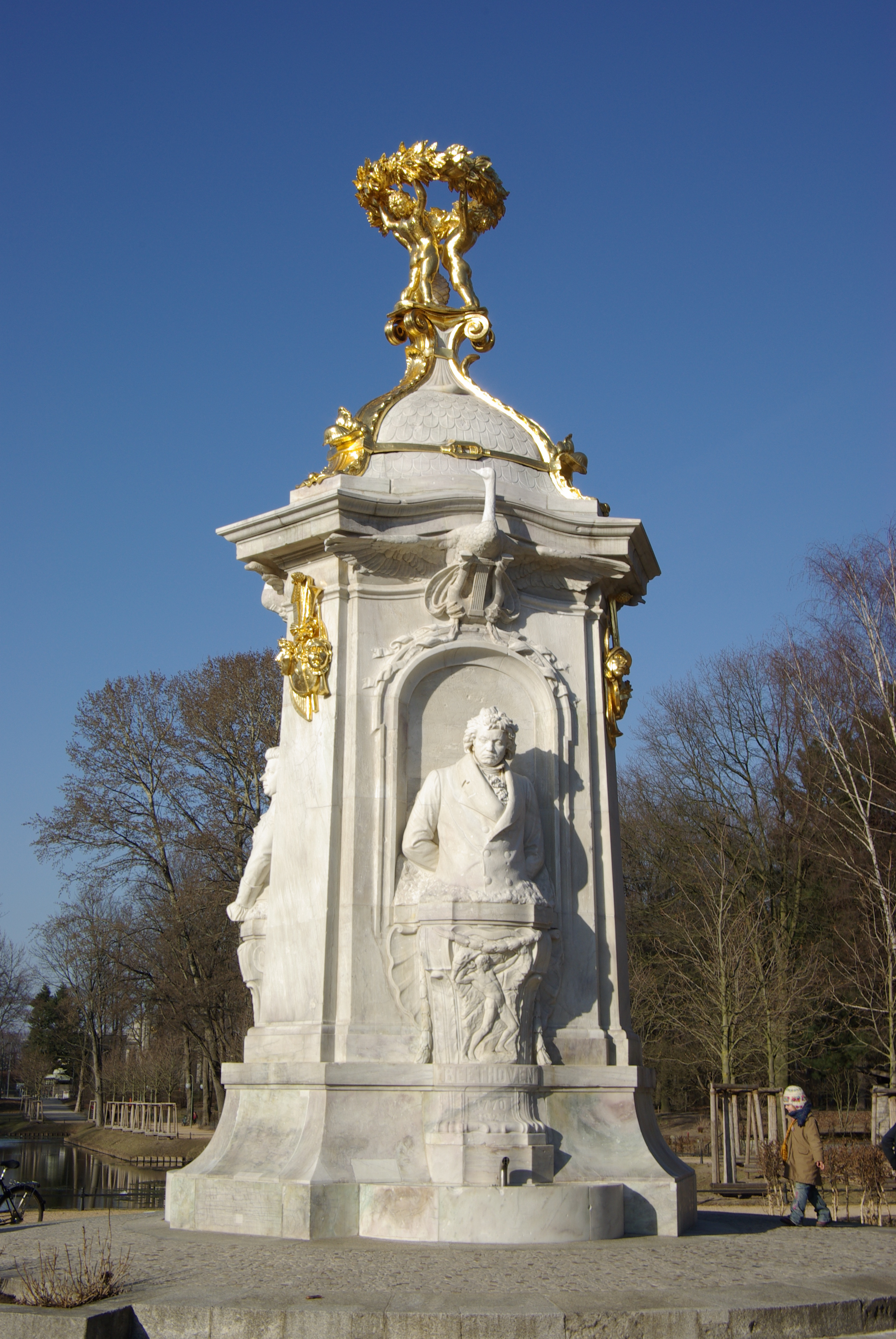 Berlin, Beethoven-Haydn-Mozart Denkmal in Tiergarten